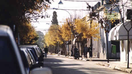 Vista clásica de Capilla del Señor. Se aprecia la calle Belgrano al 400 y la torre de la Iglesia.